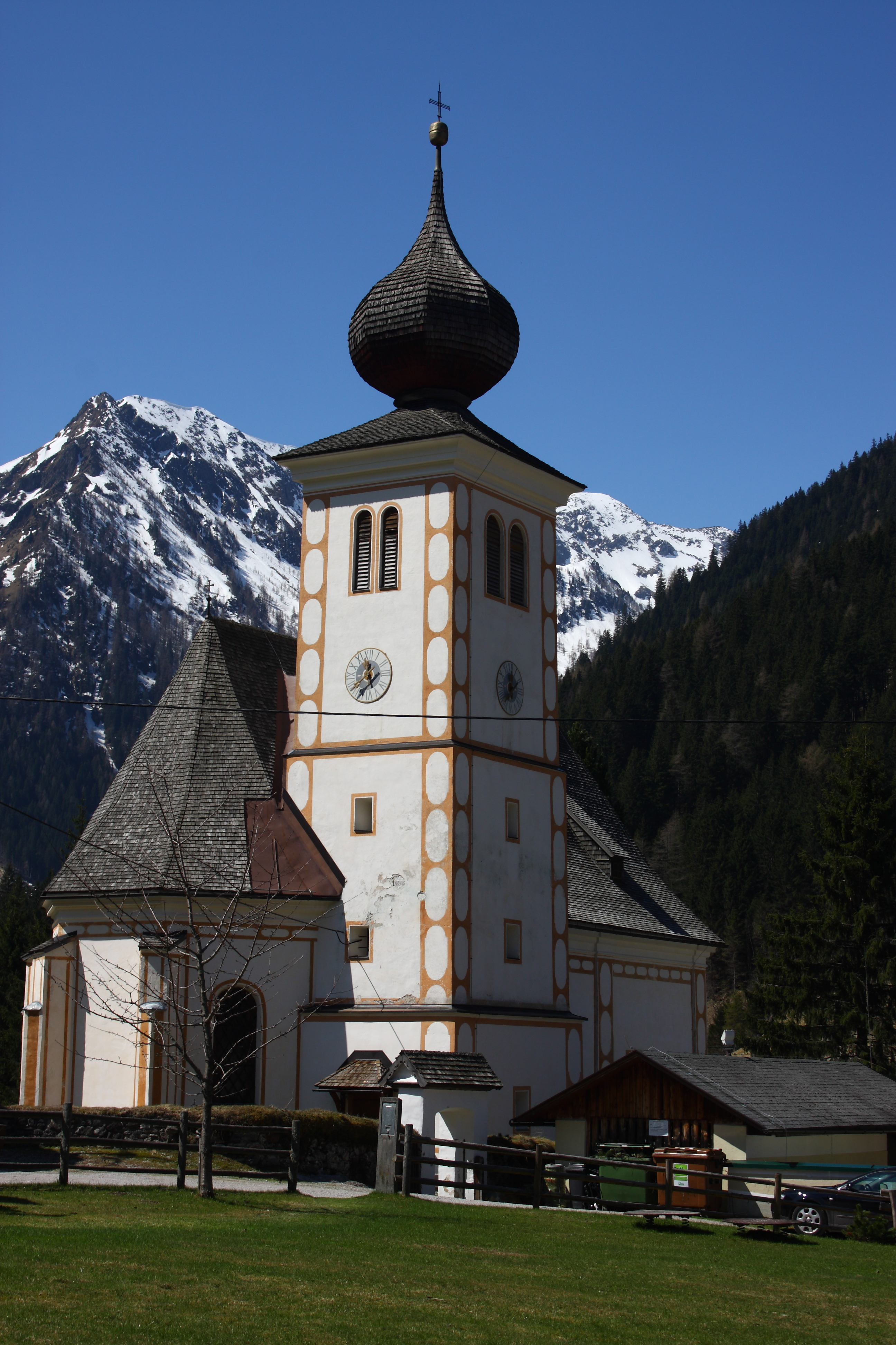 Kirche mit Friedhof in St. Nikolai im Sölktal